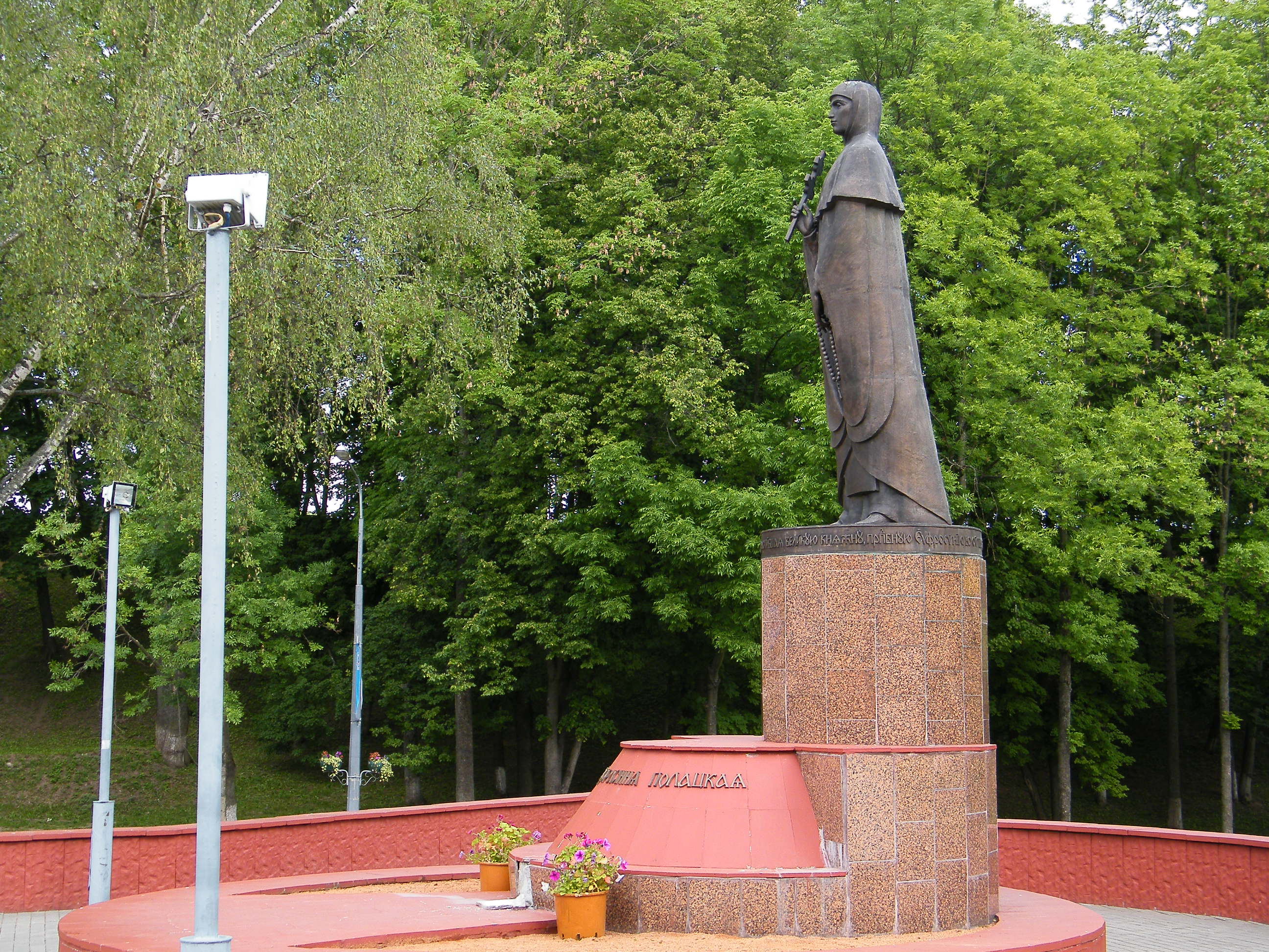 Памятник Евфросинье Полоцкой